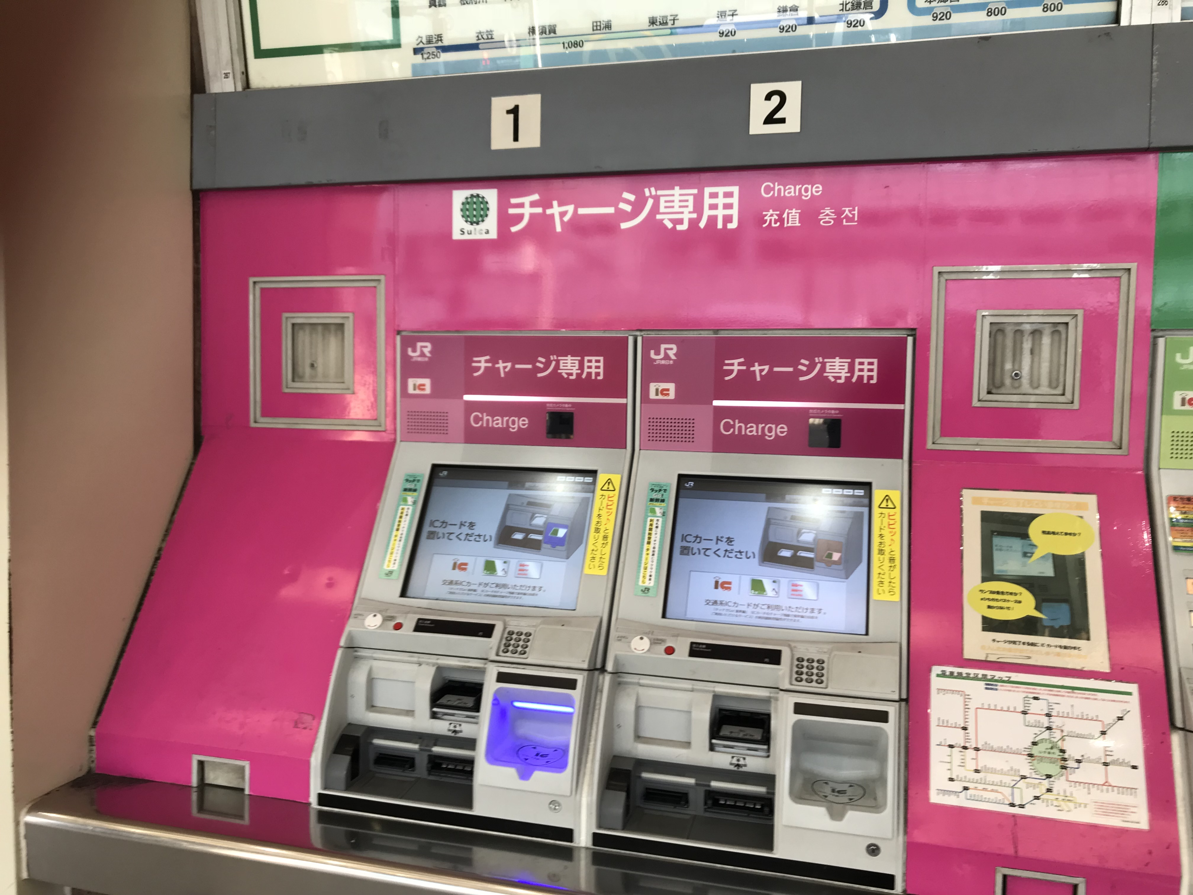 新宿駅チャージ機